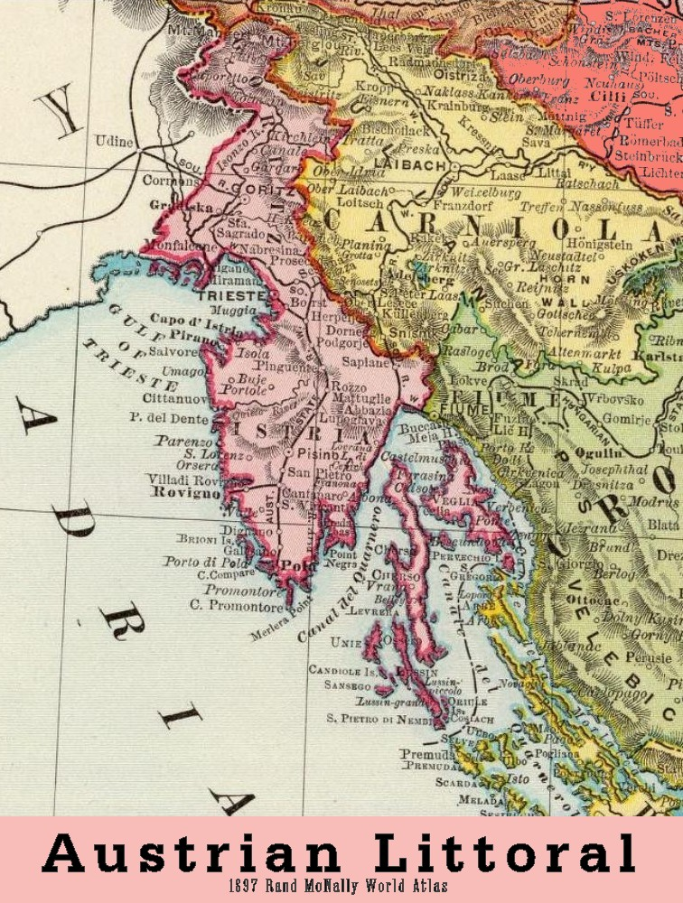 Carte Littoral Marche Julienne Littoral 1897